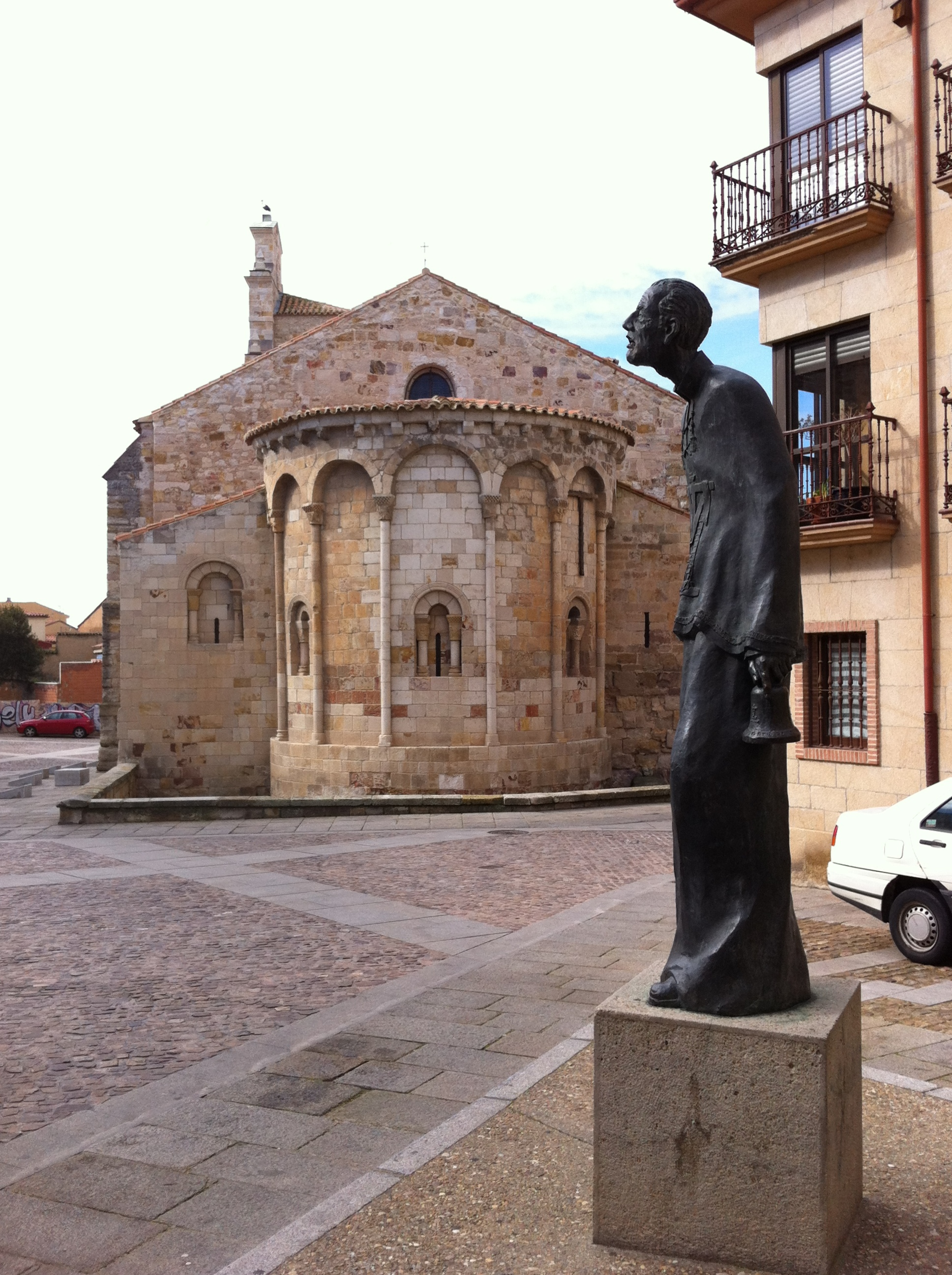 Escultura del Barandales de la Semana Santa Zamorana. Obra del Escultor Ricardo Flecha Barrio.